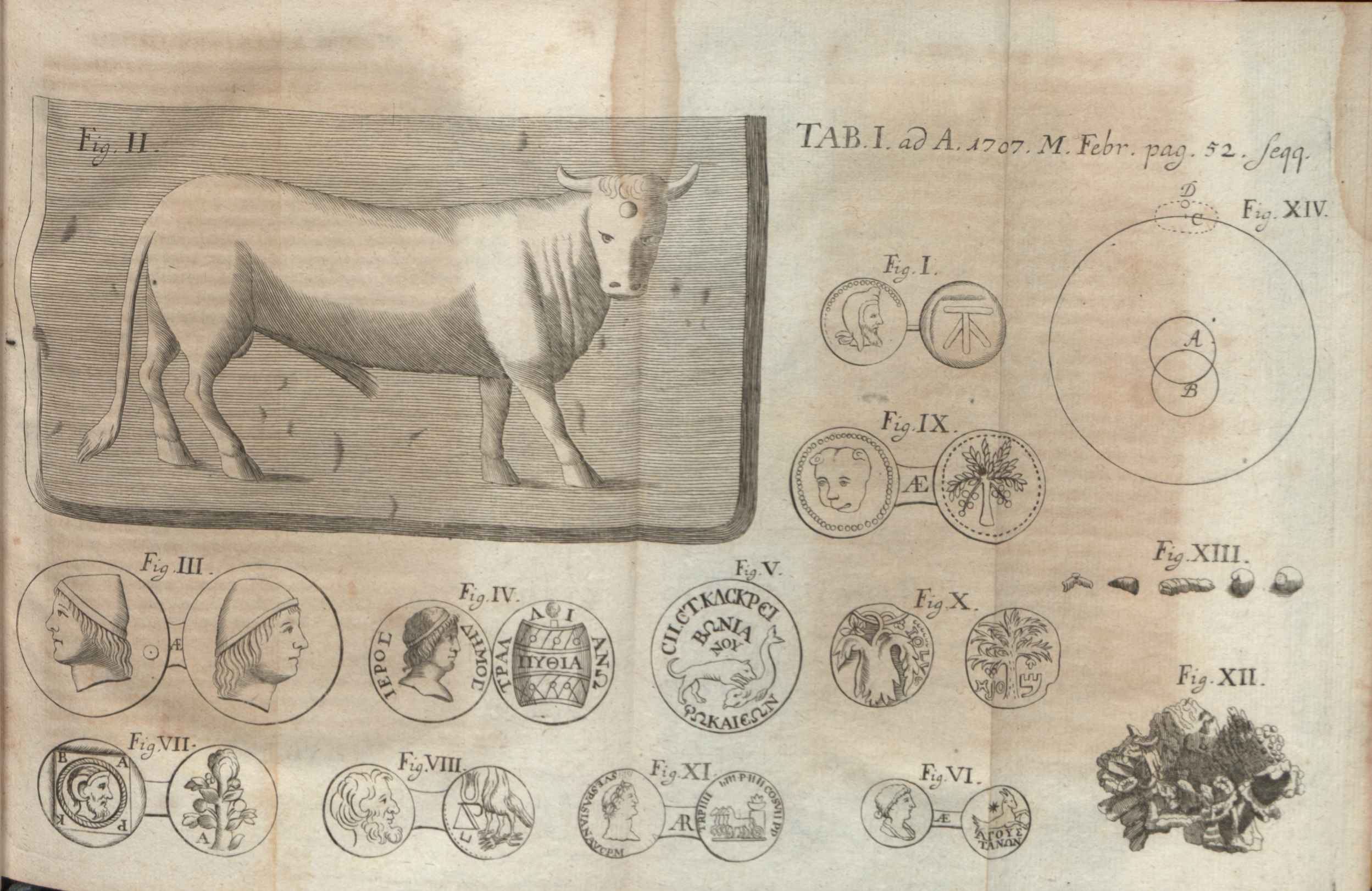 Illustration